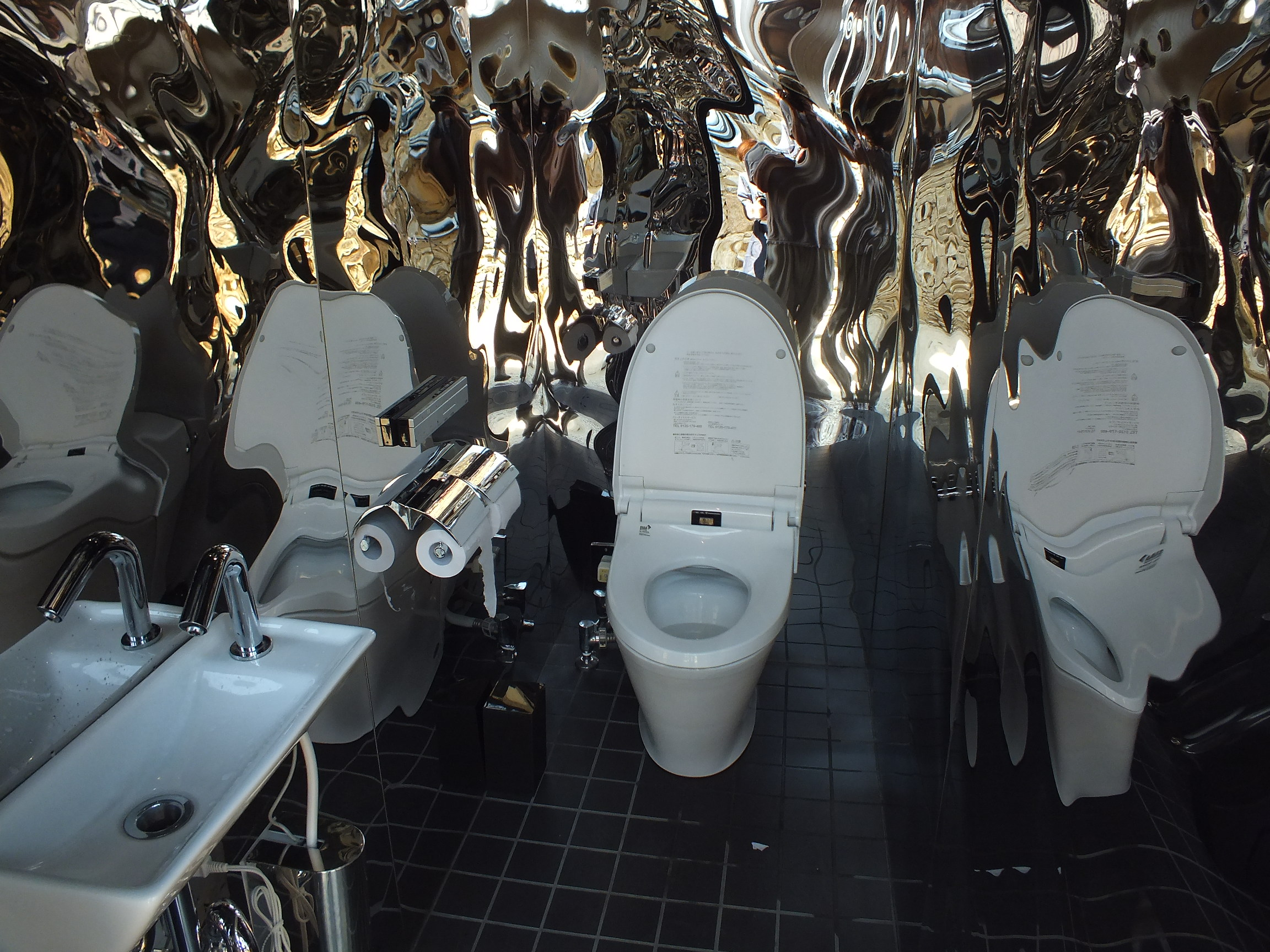 Setouchi Triennale -Teshima Yokoo House （豊島横尾館）横尾忠則-永山裕子